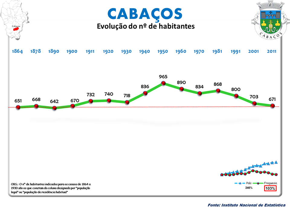 Censos 1864/2011